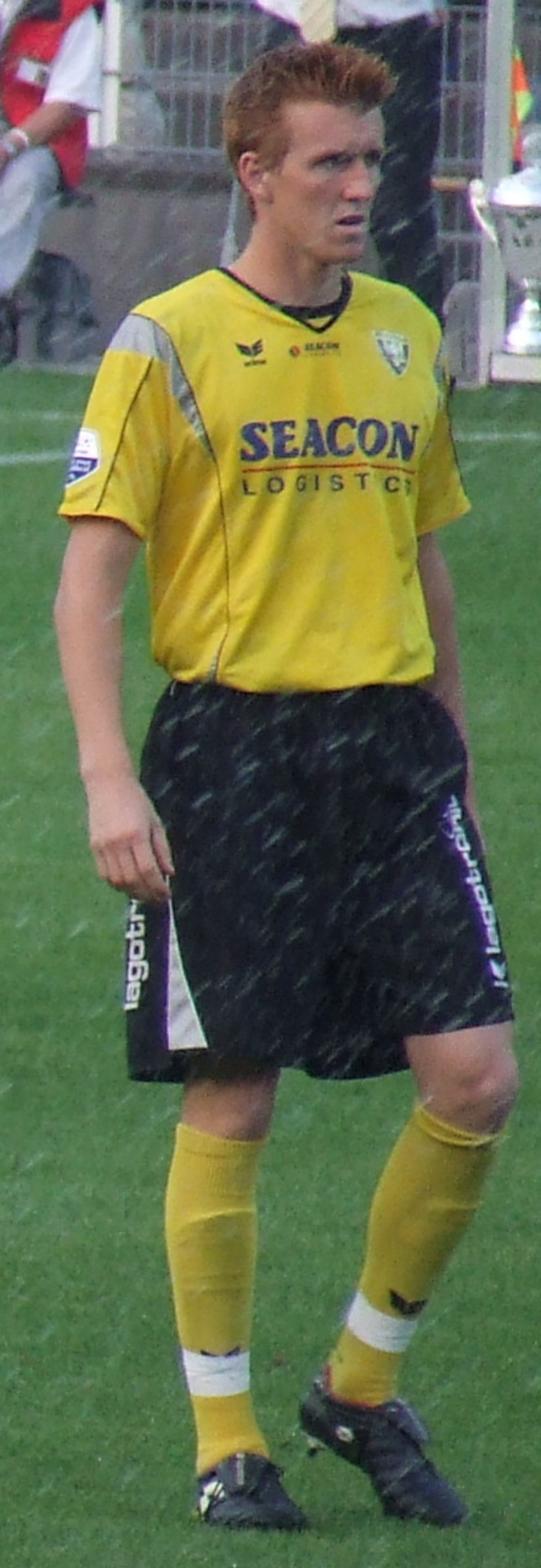 Ken Leemans 28 augustus 2007.